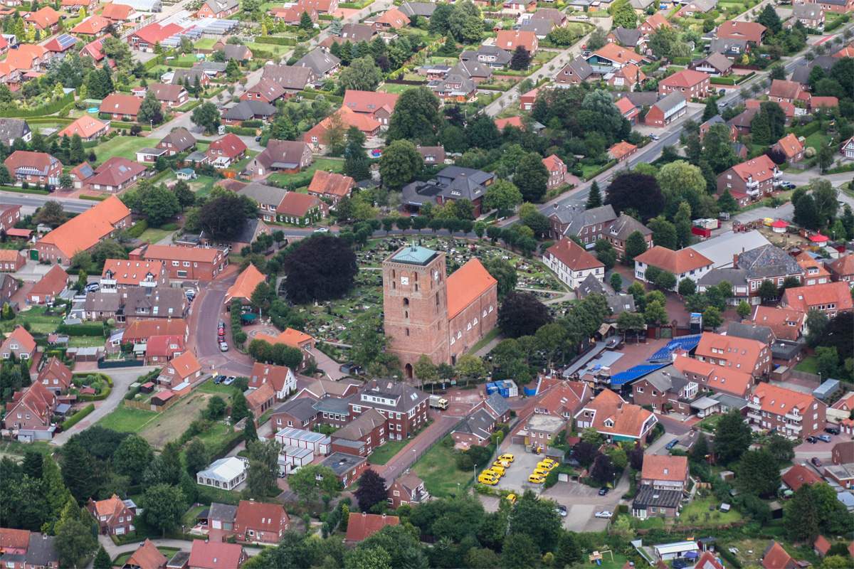 Luftaufnahme von Marienhafe